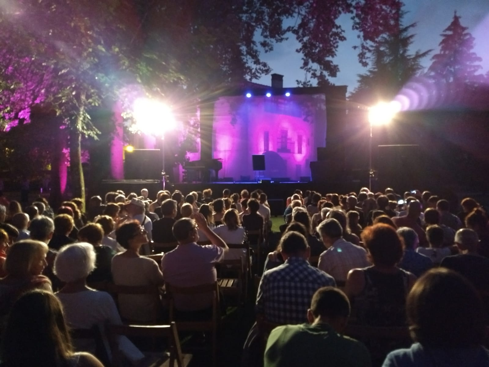 Musikaire 2018ko ekitaldi bat Lariz jauregian